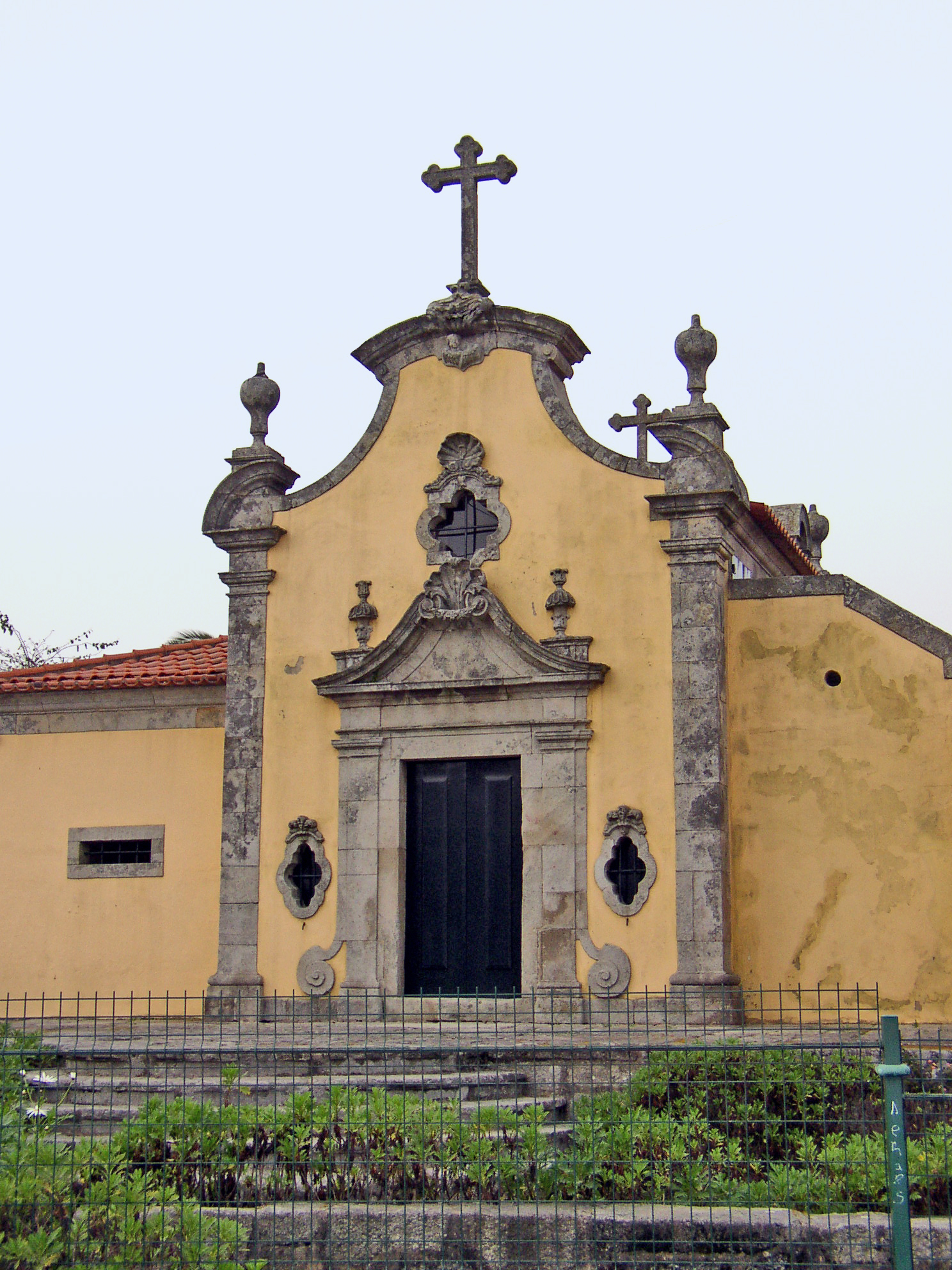 Quinta do Viso (Baroque), ou Casa da Quinta do Rio, Porto (Portugal). This file was uploaded for Wiki Loves Monuments in Portugal with the unique identifier 73705.